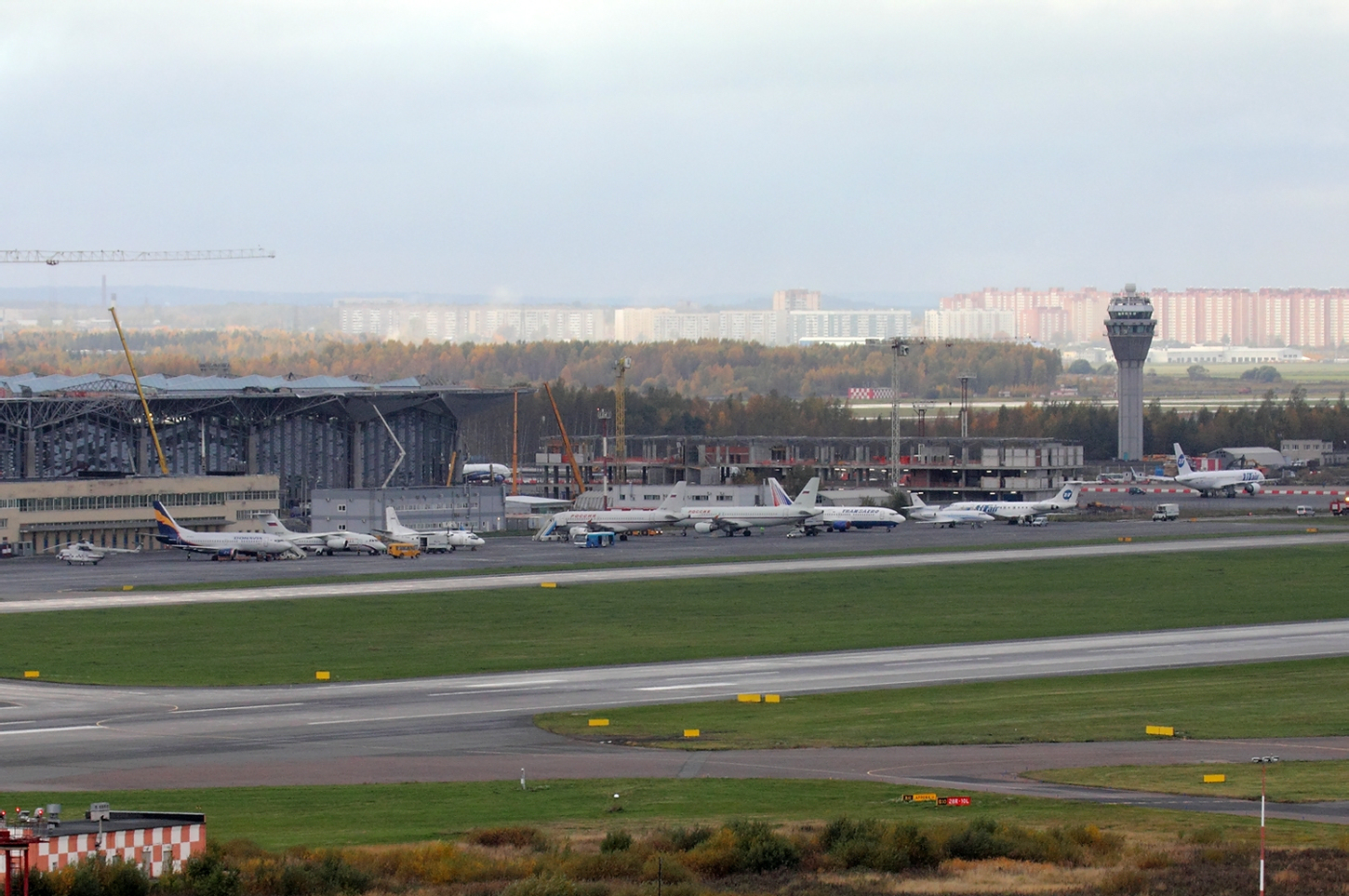 Pulkovo Airport